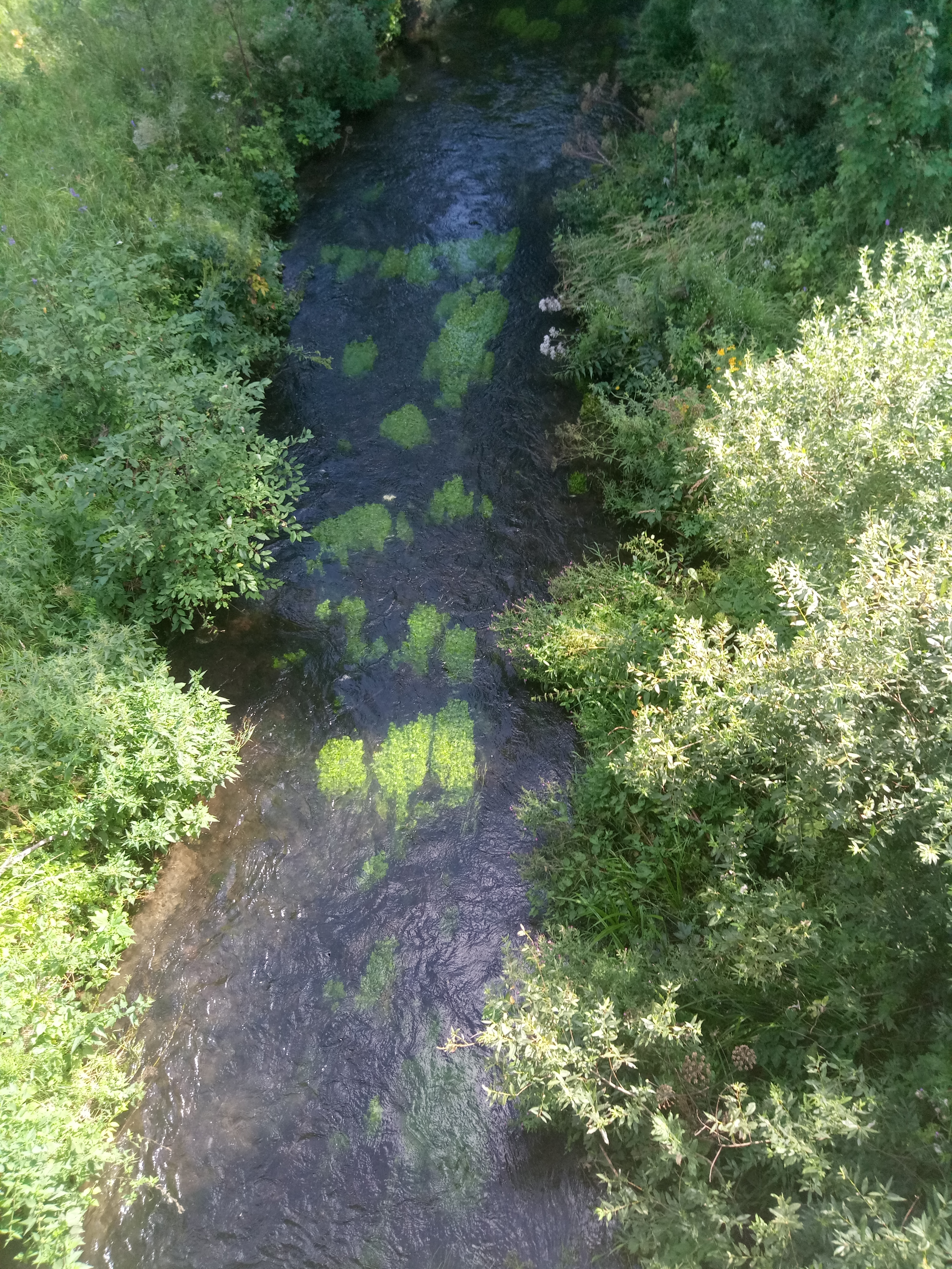 Розка близ деревни Сомовки